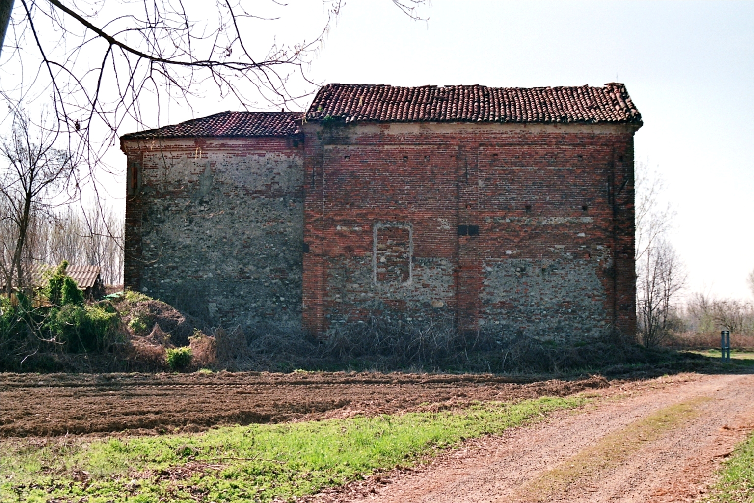 Fara Novarese (NO), Chiesa della Beata Vergine Addolorata o Madonna dei Campi, laterale.